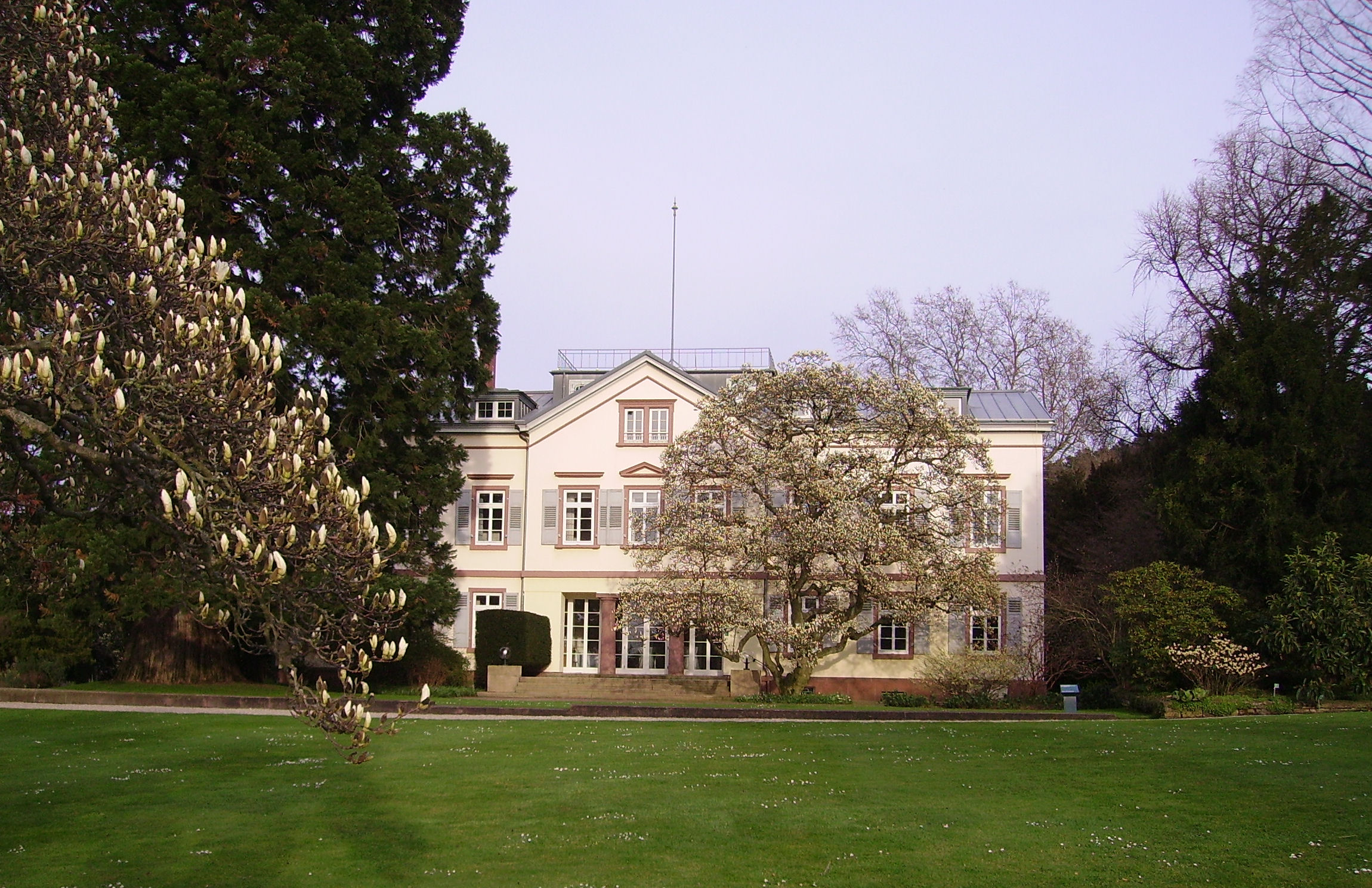 garden in Weinheim, Germany